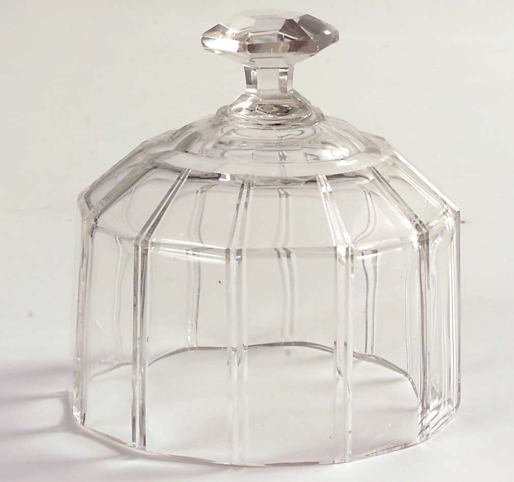 Osteklokke i glass fra andre halvdel av 1800-tallet. Foto Anne-Lise Reinsfelt / Norsk Folkemuseum, NF.1968-0237.